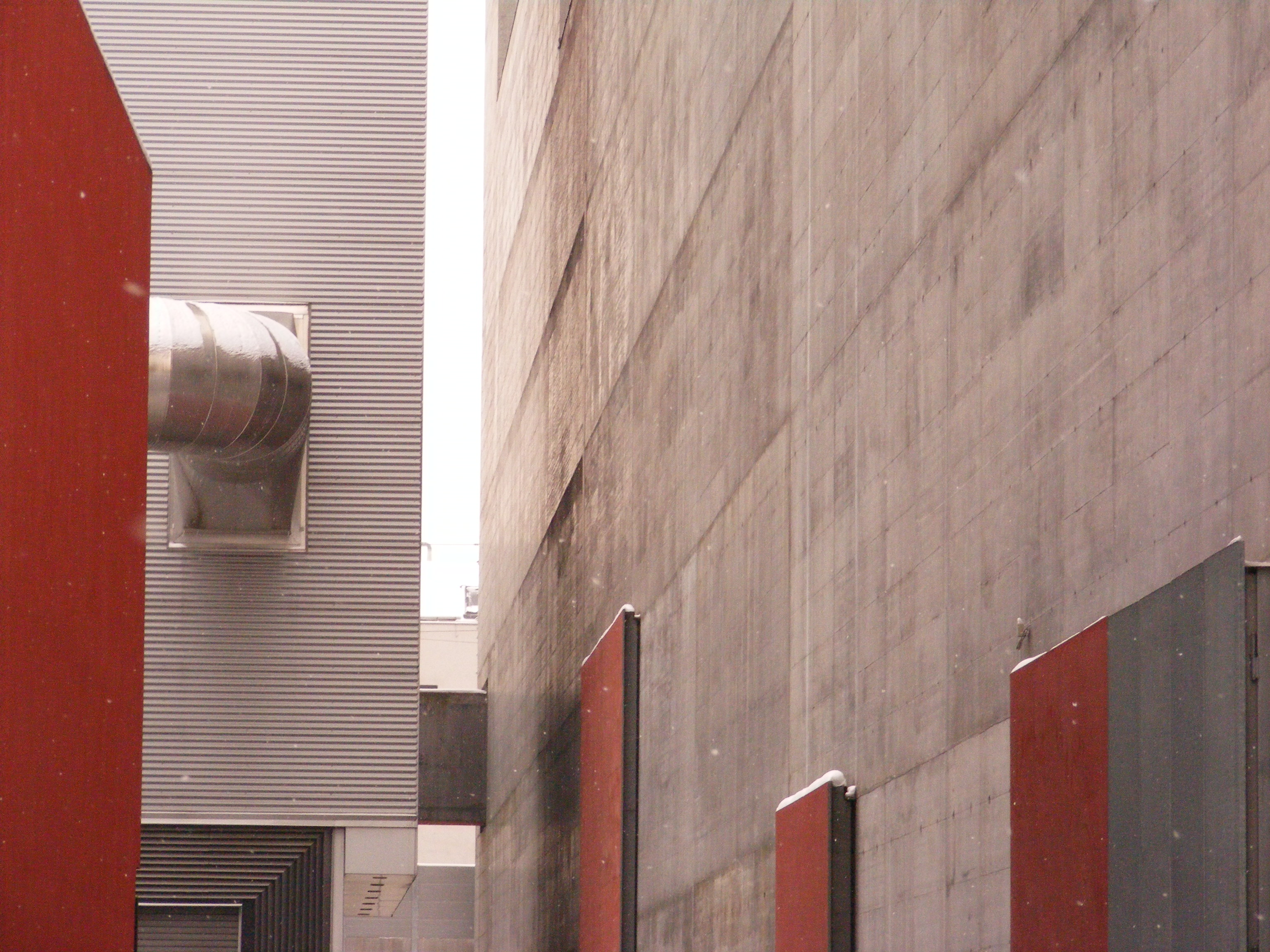 Heizkraftwerk Salzburg Mitte, seitliche Ansicht